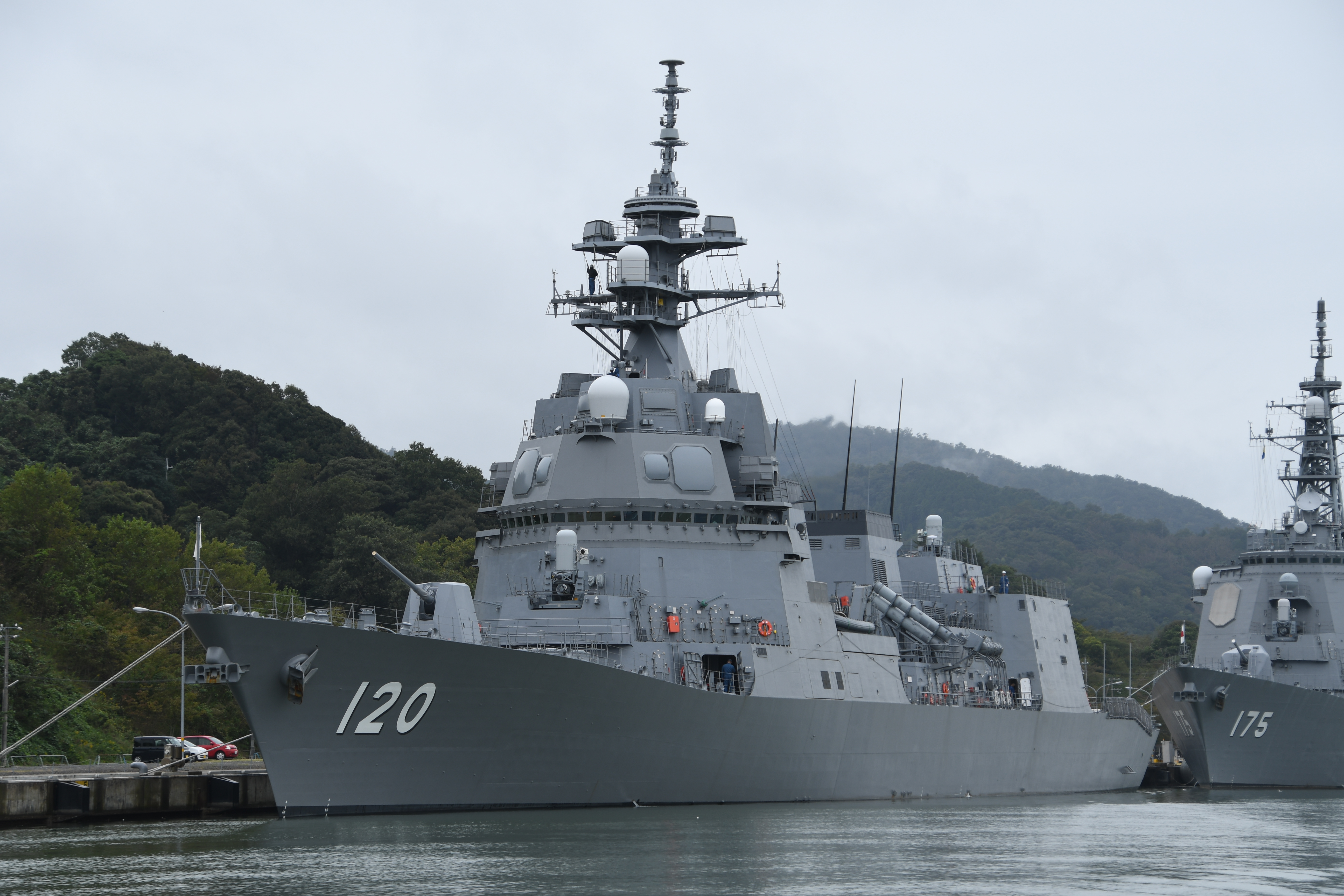 海上自衛隊 護衛艦しらぬい（DD-120） 左舷前面。2019年10月14日 舞鶴基地にて。